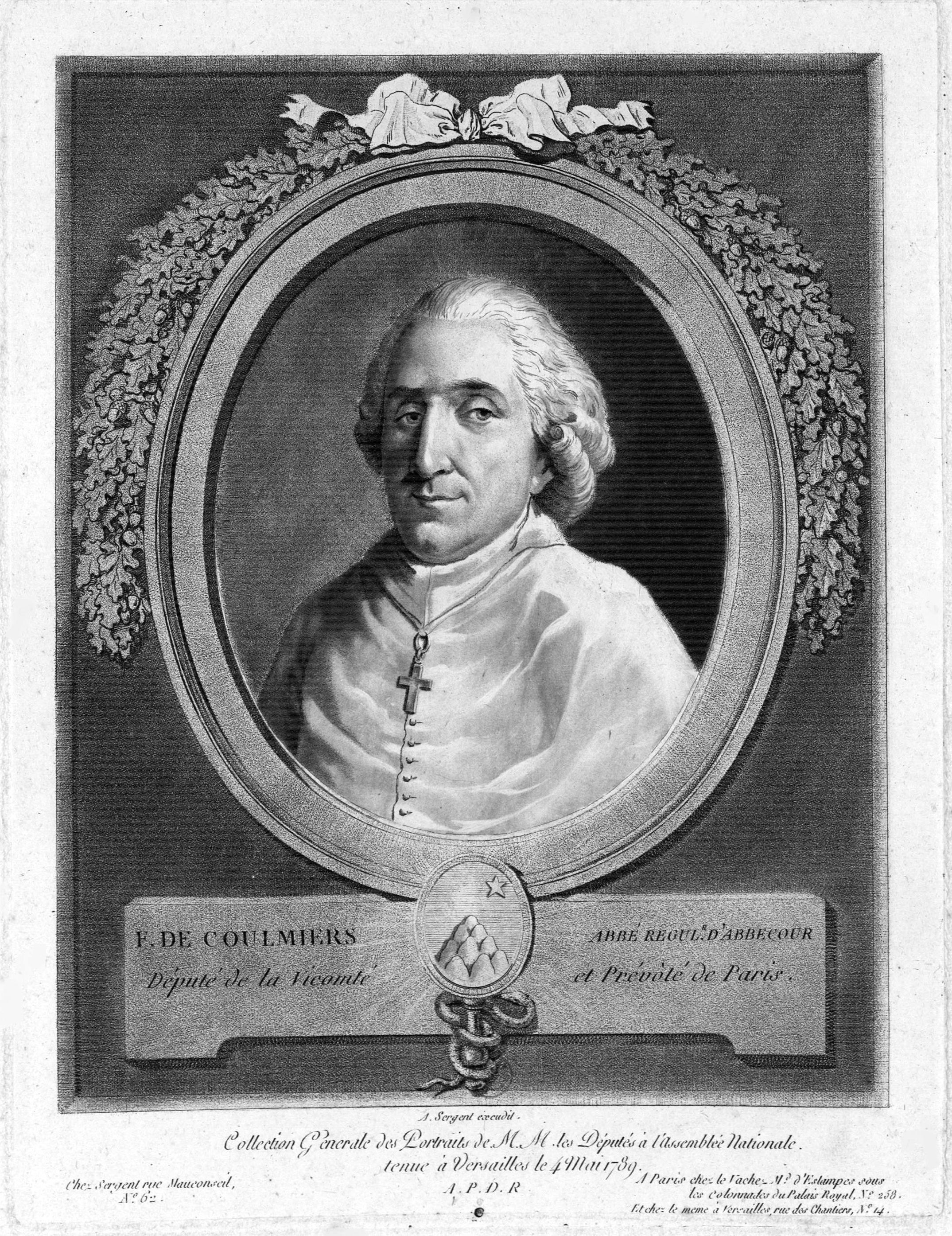 Portrait F. Simmonet de Coulmier